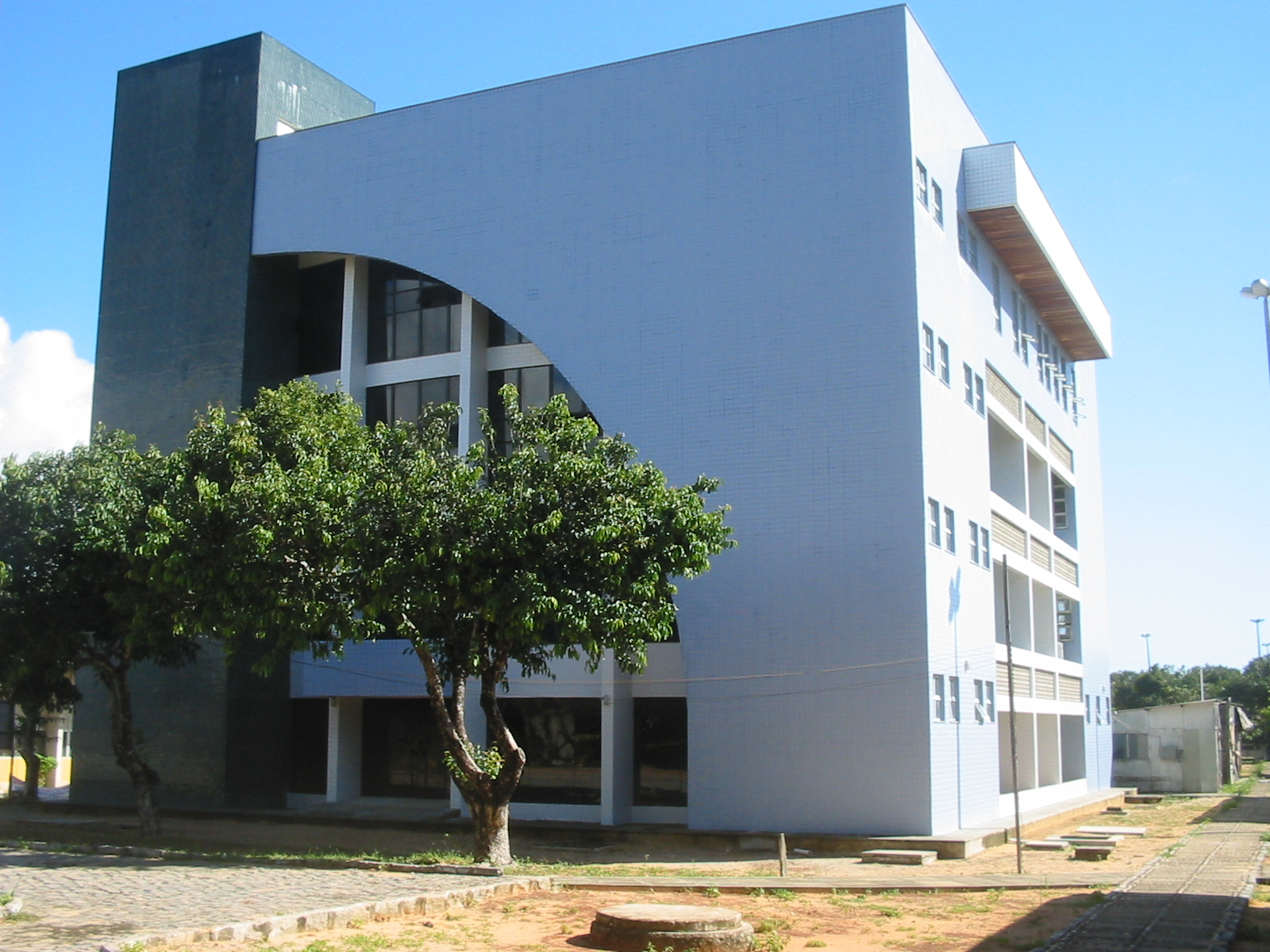 Natal (Rio Grande do Norte), Brasil. Laboratório Central de Petróleo e Gás Natural (Lacep) da Universidade Federal (UFRN). Natal, Brazil. UFRN.